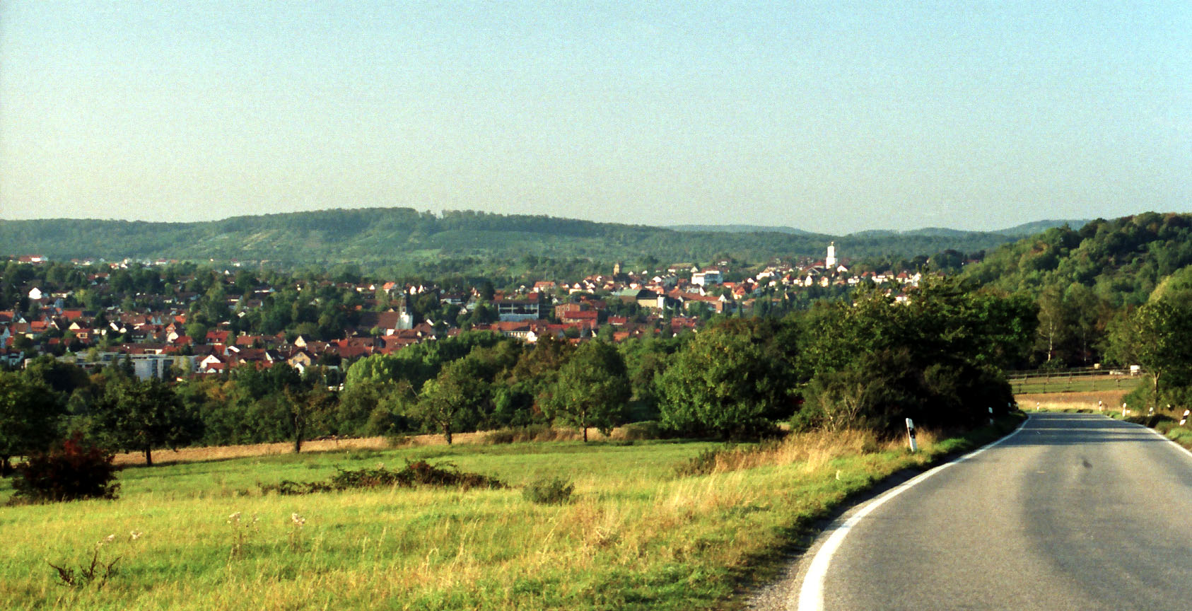 Ansicht von Mühlacker aus Richtung Süden. Im Vordergrund Dürrmenz, dahinter die Kernstadt Mühlacker